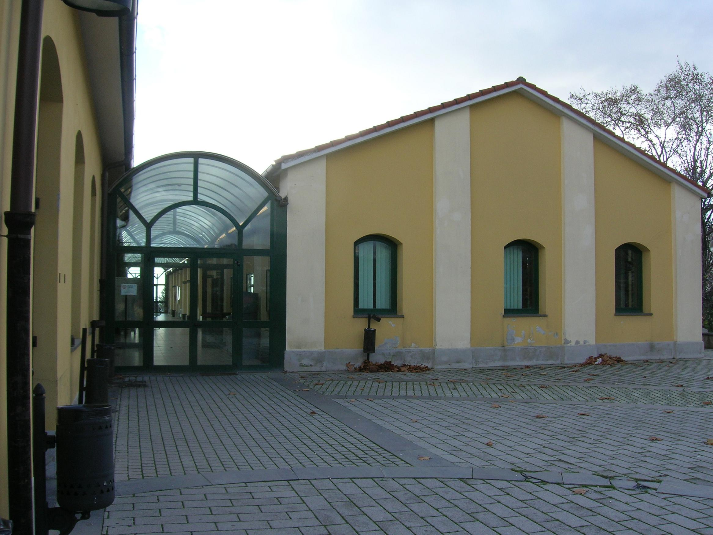 La Spezia - Polo Universitario "Guglielmo Marconi"